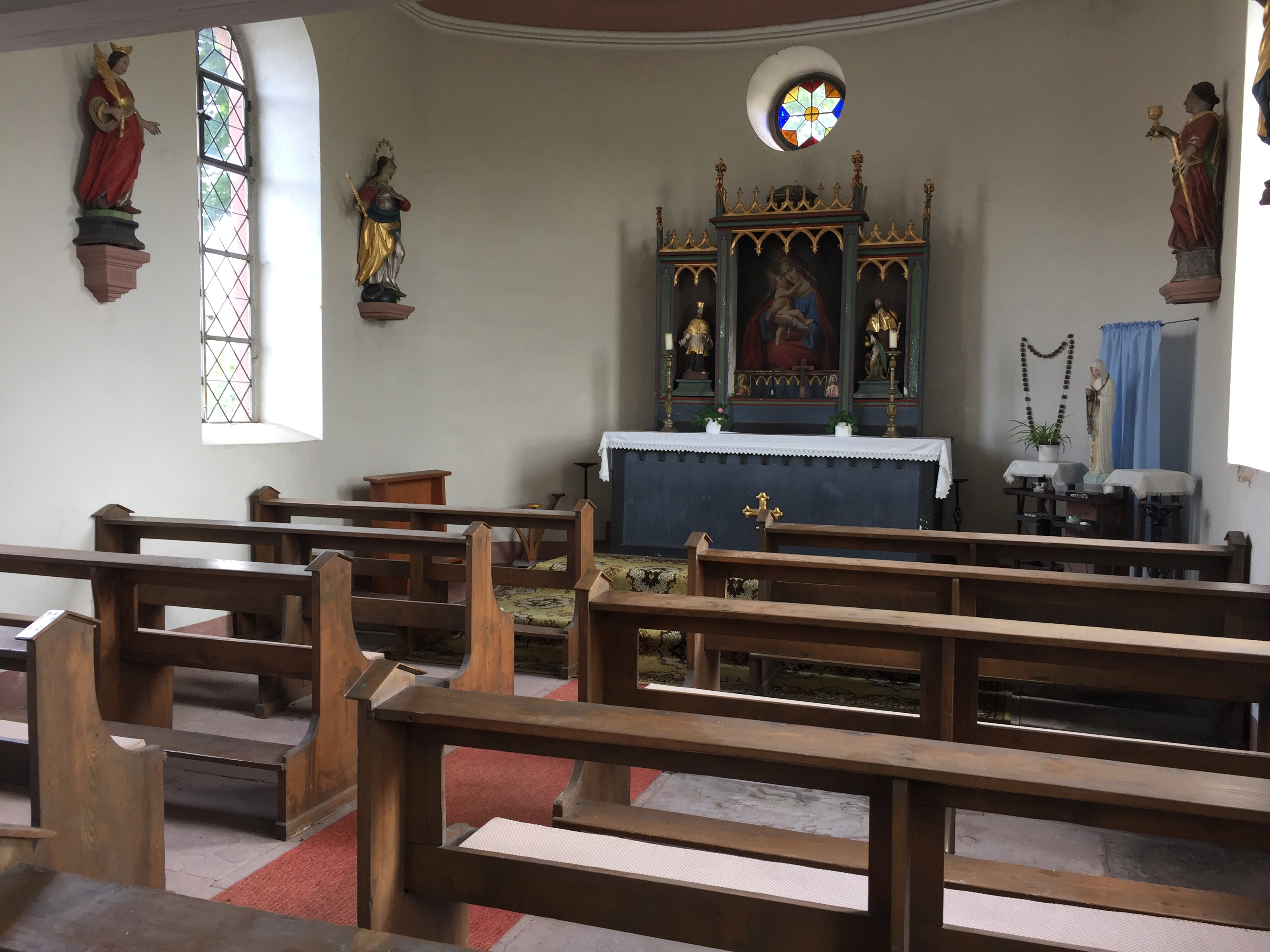 Innenansicht der Maria-Hilf-Kapelle/St.Marien Kapelle